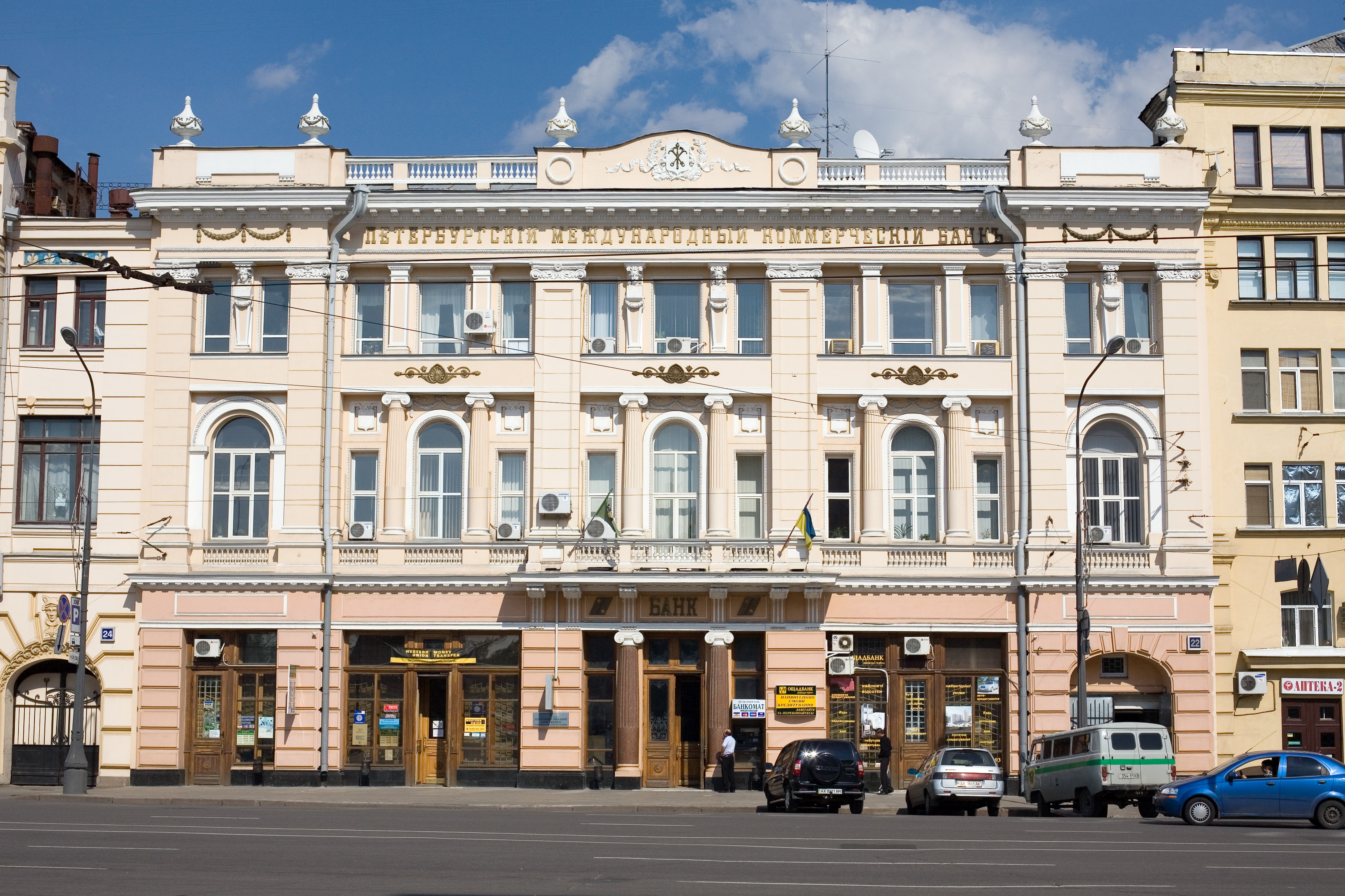 SPb Commercial Bank Building (Kharkov). С.-Петербургский международный коммерческий банк, архитектор В.В. Величко, 1910-1913. Стиль ренессанс. Николаевская площадь (ныне пл. Конституции), дом 22. В СССР Центральная сберегательная касса города, с 1992 центральное отделение Ощадбанка Украины. Памятник архитектуры. Интерьер - двухэтажный двухсветный операционный зал с широким балконом.